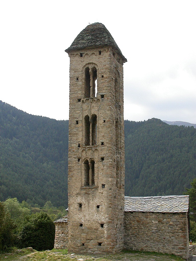 Església de Sant Miquel d'Engolasters